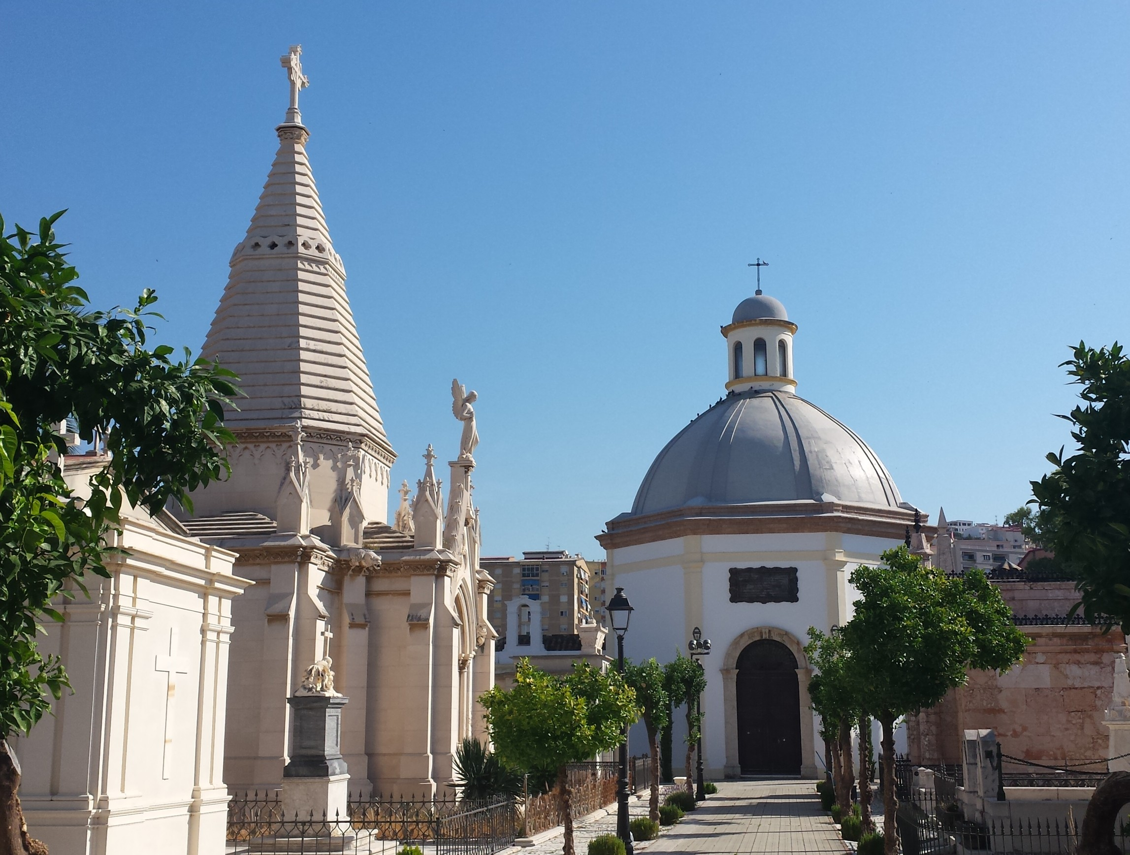 Vista desde la entrada principal del cementerio, mostrando al fondo la Capilla.